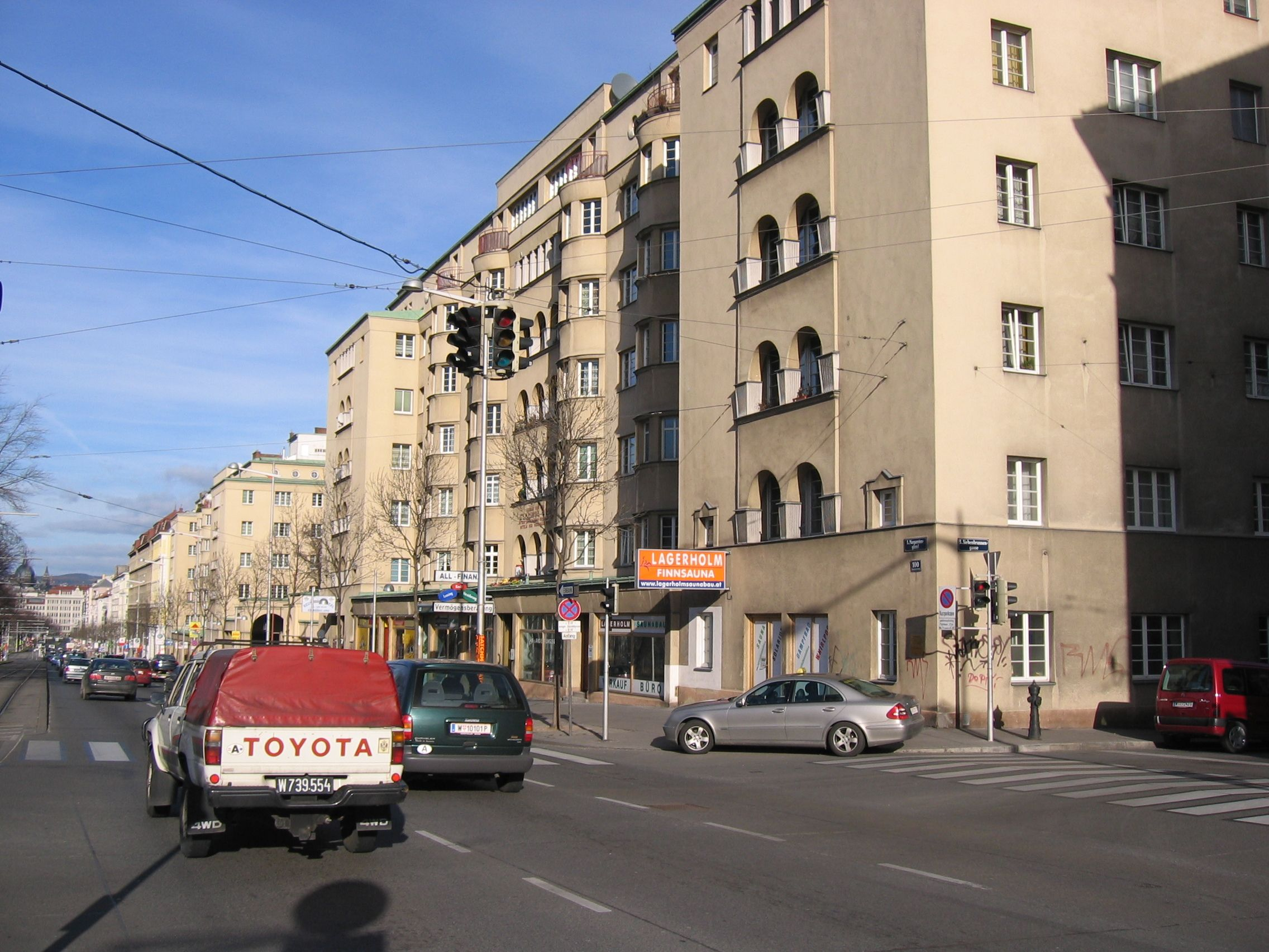 Gemeindebauten am Margaretengürtel - Teil 2